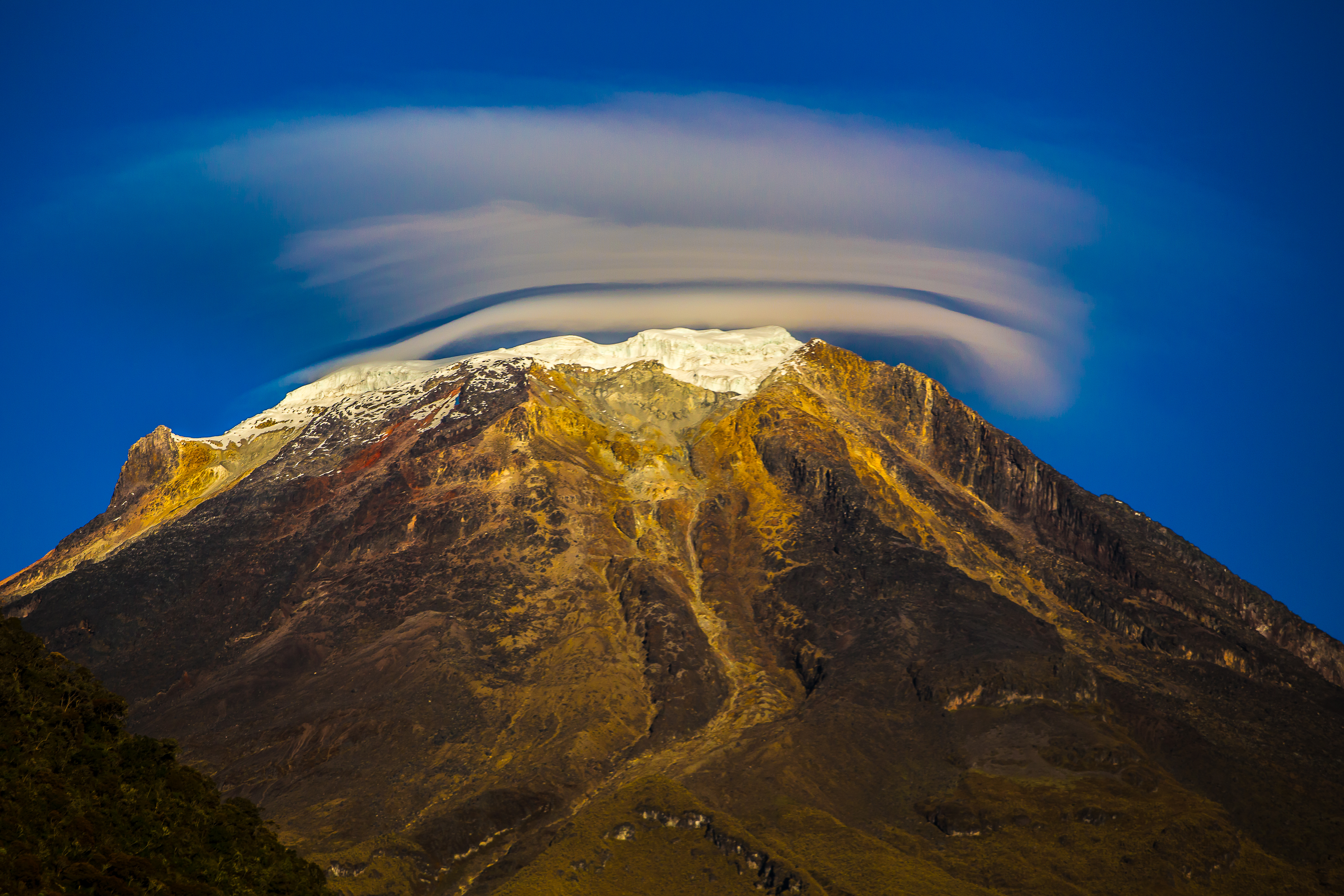 Cara oriental volcán nevado del Tolima al amanecer. Parque nacional natural de los nevados, Colombia. Esta fotografía fue tomada en un área protegida de Colombia con el código 11 del RUNAP.